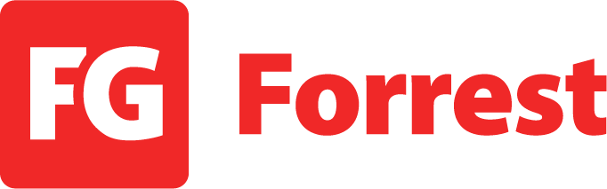 logo FG Forrest